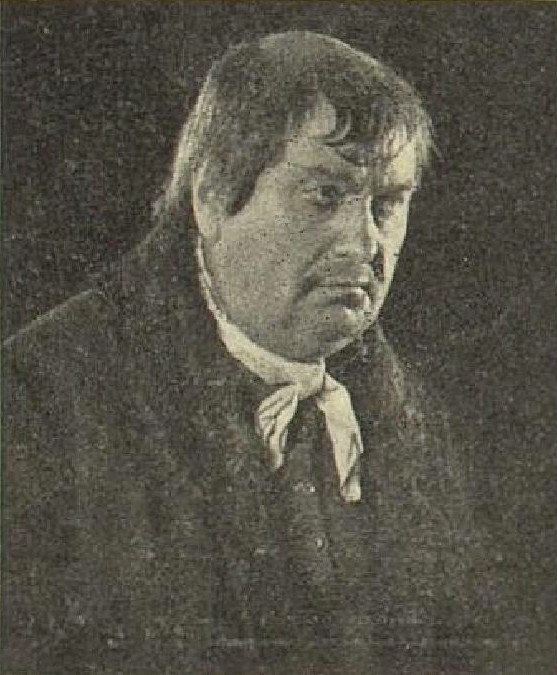 Karel Fiala (1871-1931), český herec